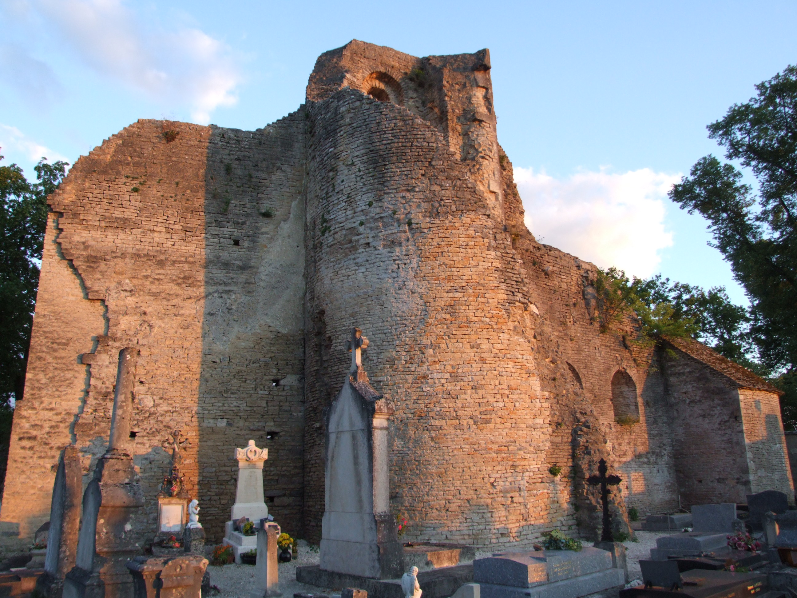 Vestiges du Château, Châtillon-sur-Seine, Côte-d'Or, Bourgogne, FRANCE